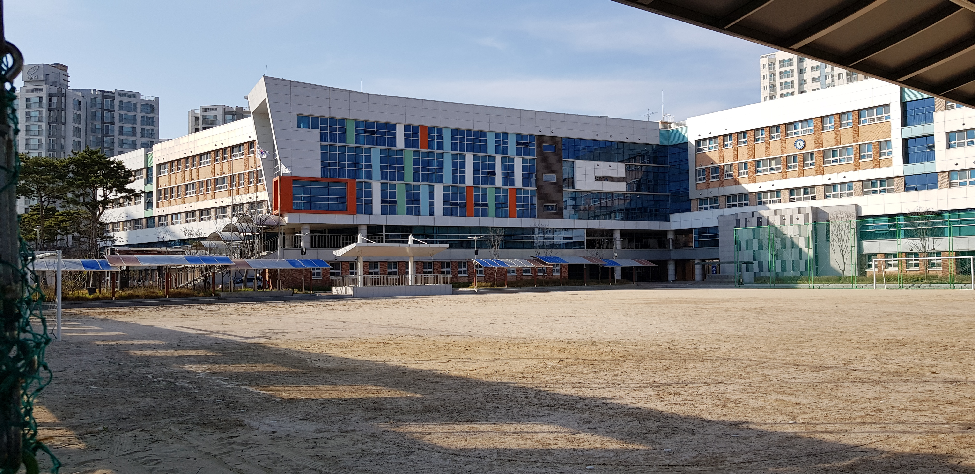 청북고등학교의 사진